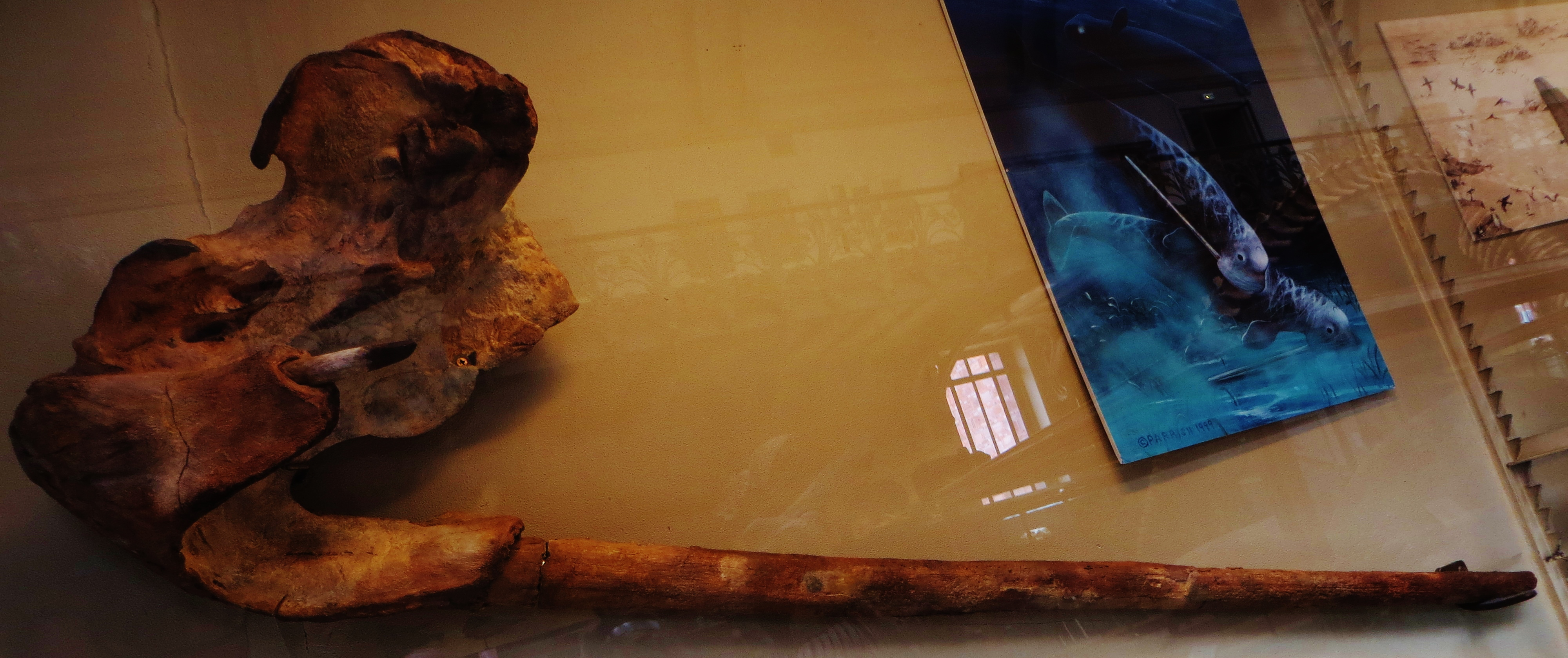 Fossil of Odobenocetops, an extinct mammal- Took the photo at Musee d'Histoire Naturelle, Paris